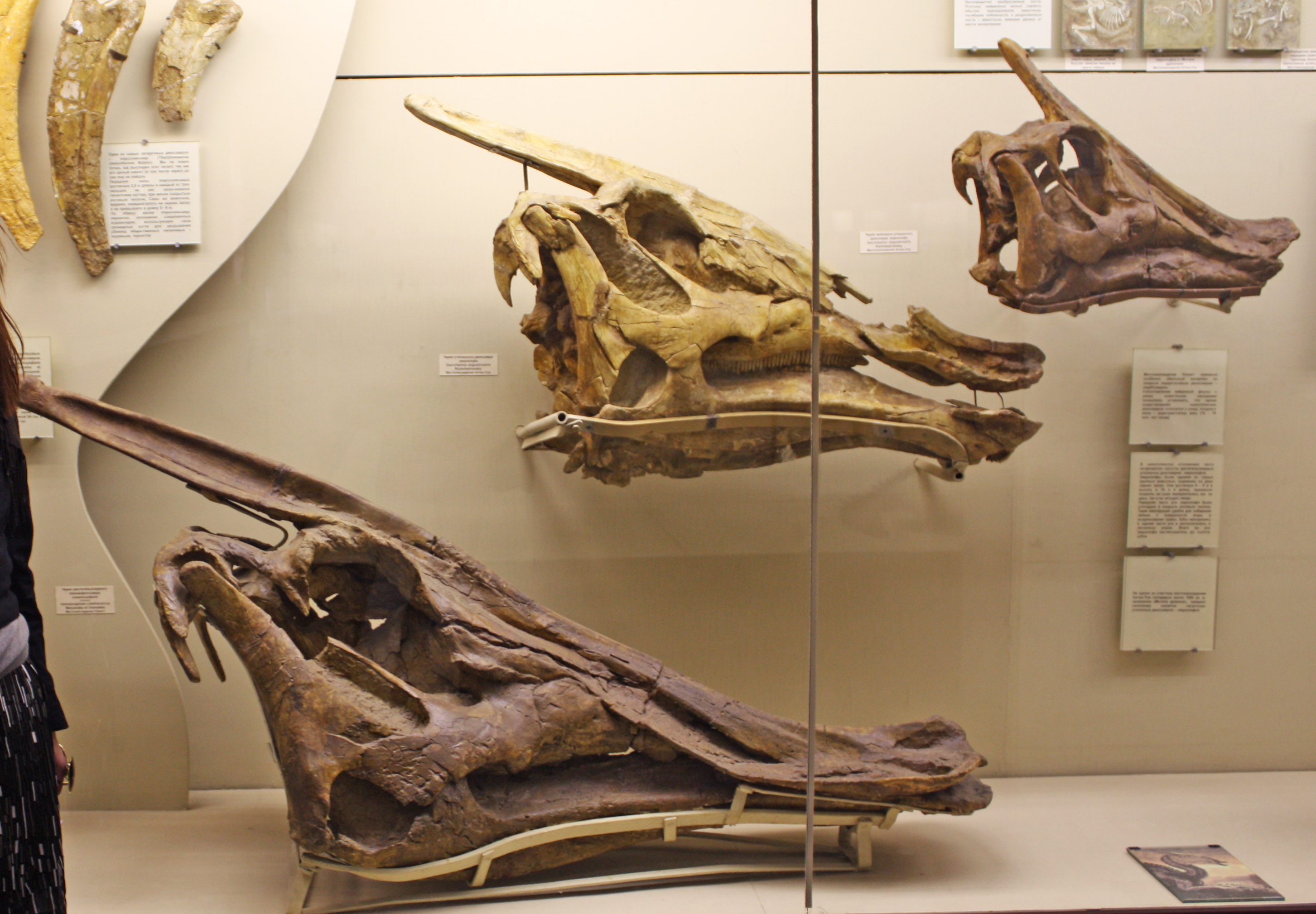 Saurolophus skulls, Palaeontological Institute RAS